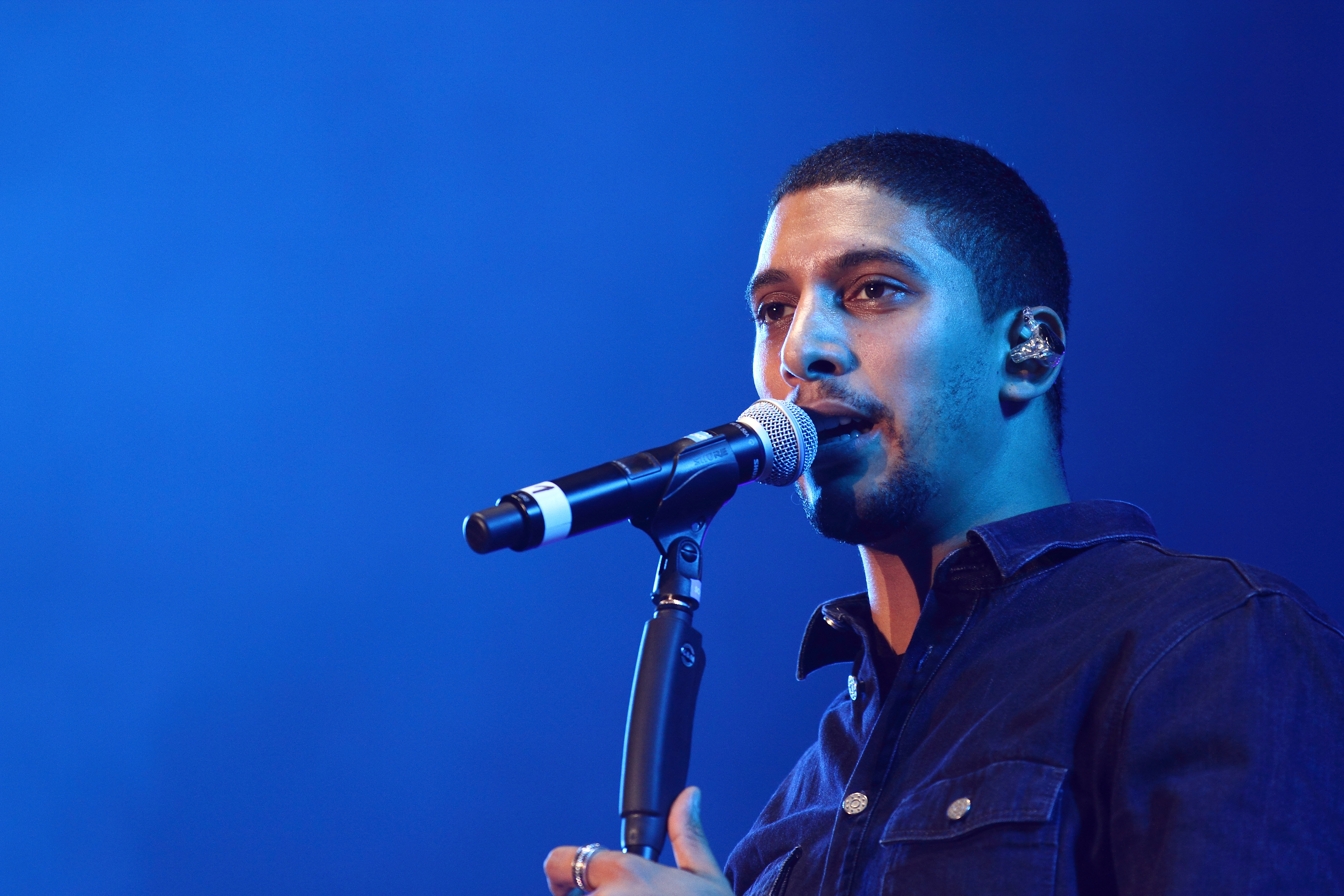 Andreas Bourani auf dem ENERGY IN THE PARK Festival 2014 Festivalsommer This photo was created with the support of donations to Wikimedia Österreich and Wikimedia Deutschland in the context of the CPB project "Festival Summer". For taking this photo and licensing it under a free licence a (press) accreditation was required. The photographer had a valid accreditation and has sent it to the email response team, it has been archived in the OTRS system. Users with OTRS account can access it here. Please be aware that (press) accreditations are a permission to generally take photos only and do not make any statement about the copyright status of this photo! Link to the ticket: Personality rights warningAlthough this work is freely licensed or in the public domain, the person(s) shown may have rights that legally restrict certain re-uses unless those depicted consent to such uses. In these cases, a model release or other evidence of consent could protect you from infringement claims.